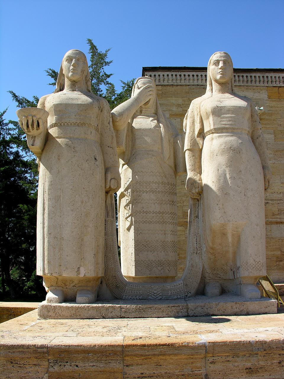 Turkey-1680